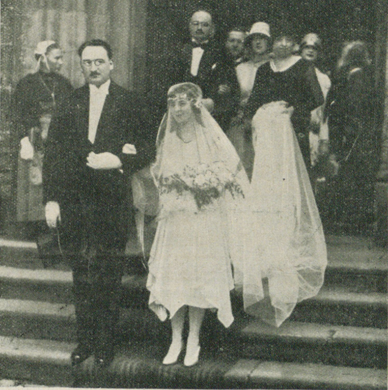 Mariage de Louis Glotin en 1928, couvert par le supplément illustré du Nouvelliste du Morbihan.